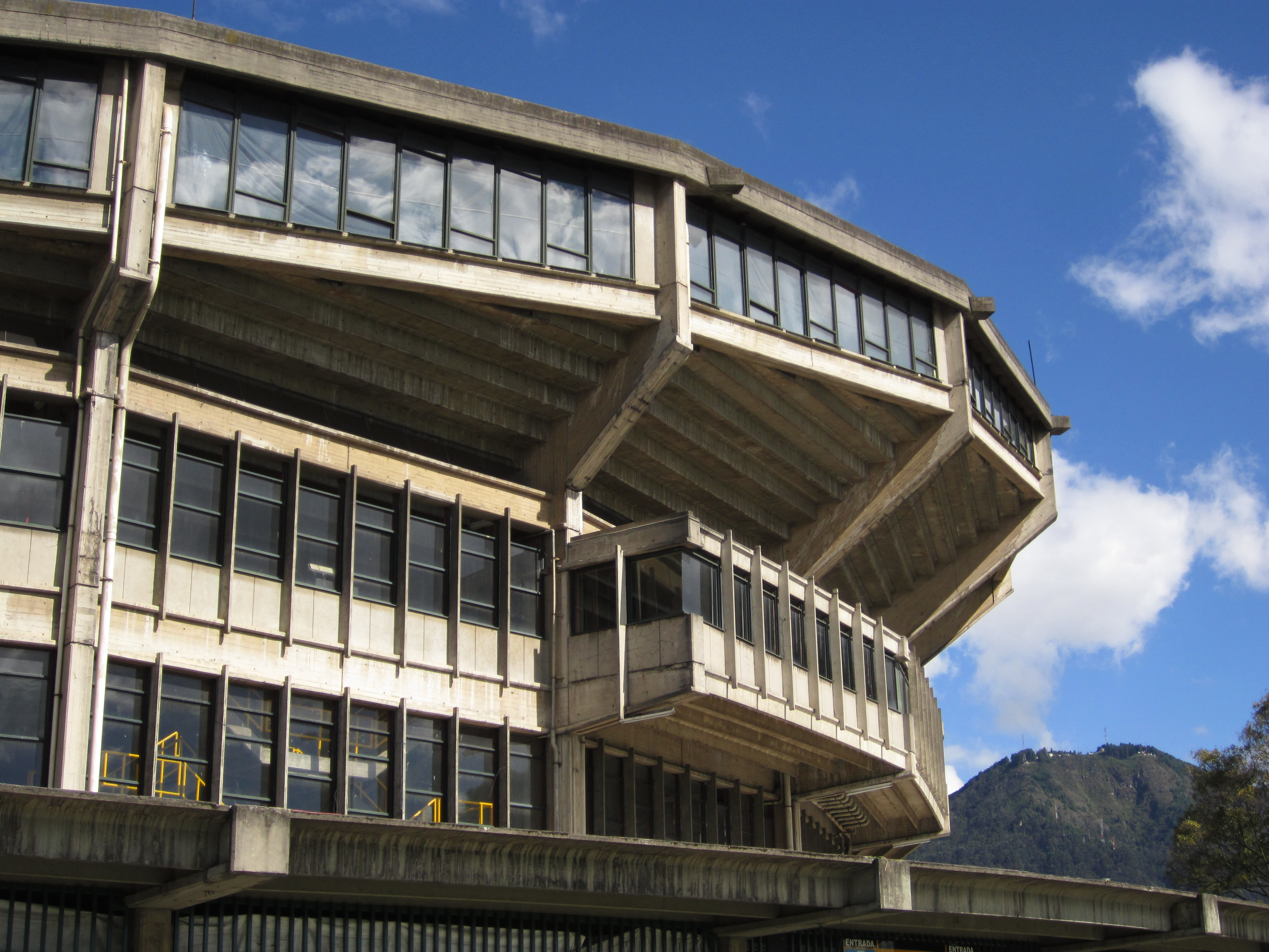 Costado sur del coliseo cubierto "El Campín".